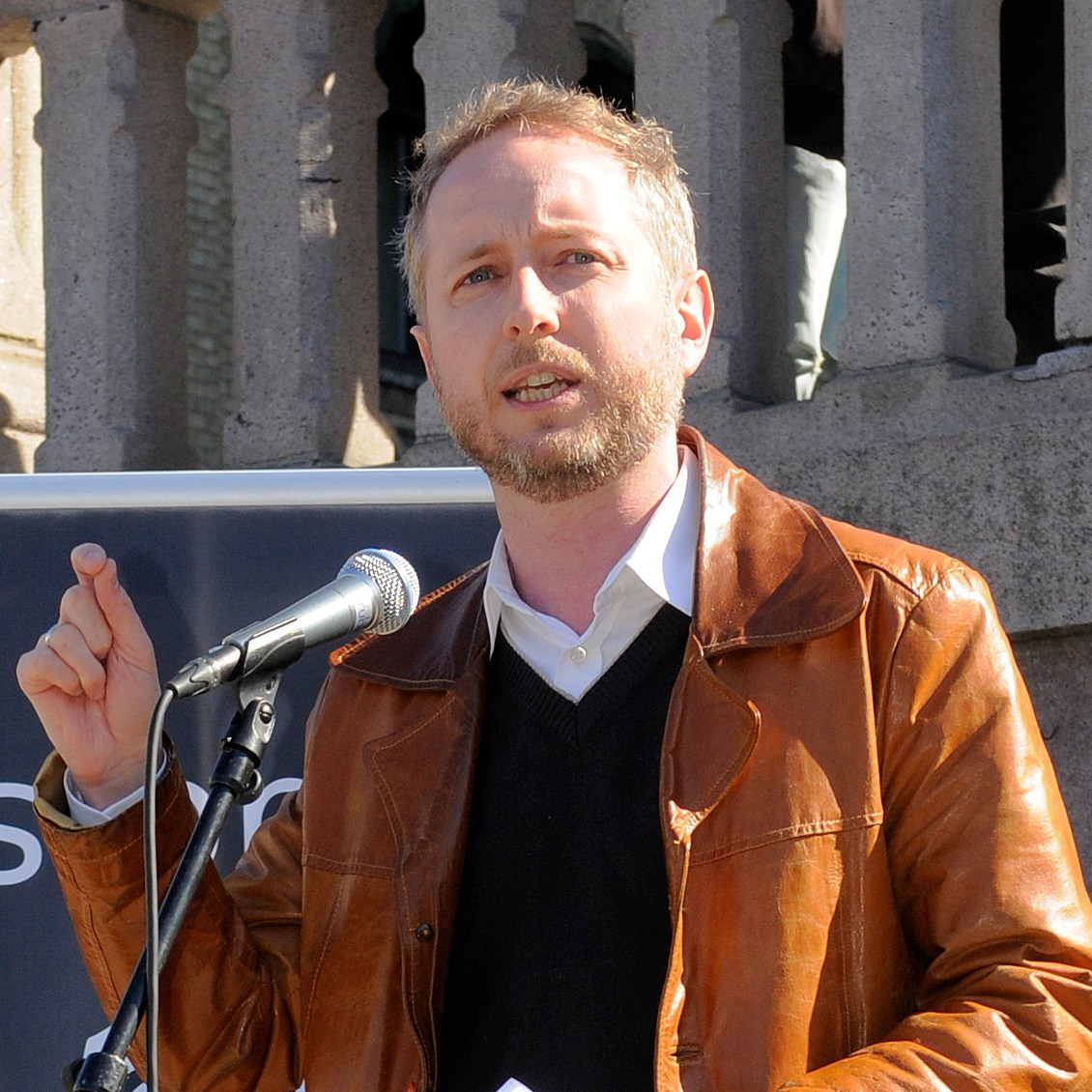 Bård Vegar Solhjell ved demonstrasjon mot Datalagringsdirektivet i Oslo